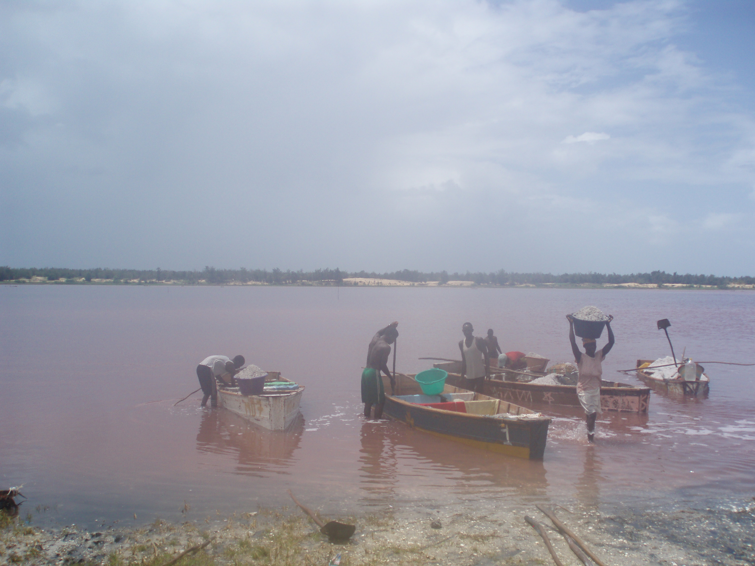 La foto recoge a trabajadores en El lago Rosa en Dakar, de ahí recogen la sal para el País. De los mayores índices de salinidad del mundo.